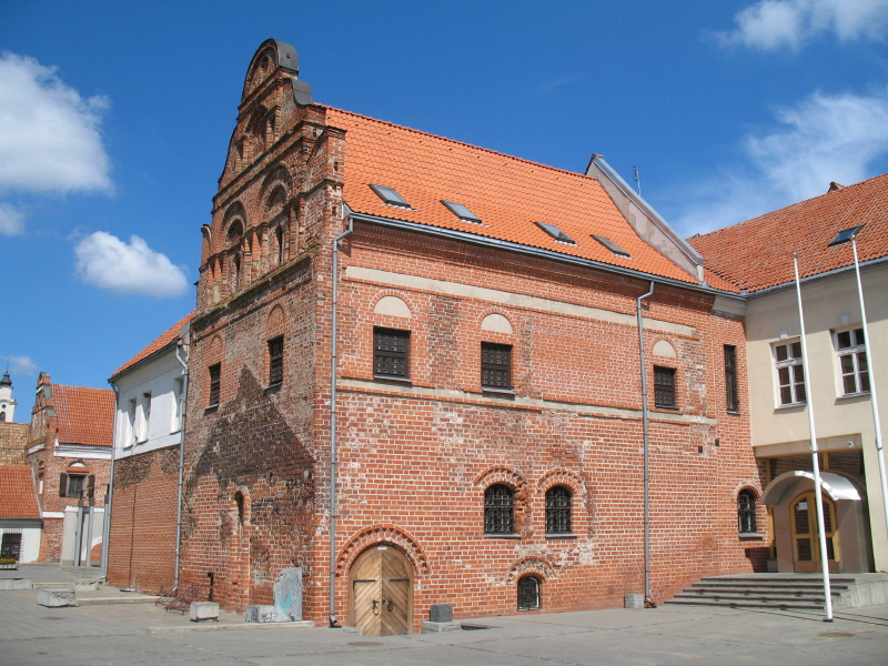 Kauno senamiestis, Napoleono namas (XVIa.).